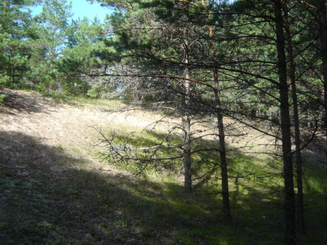 Kihelkonna maalinna liivavall